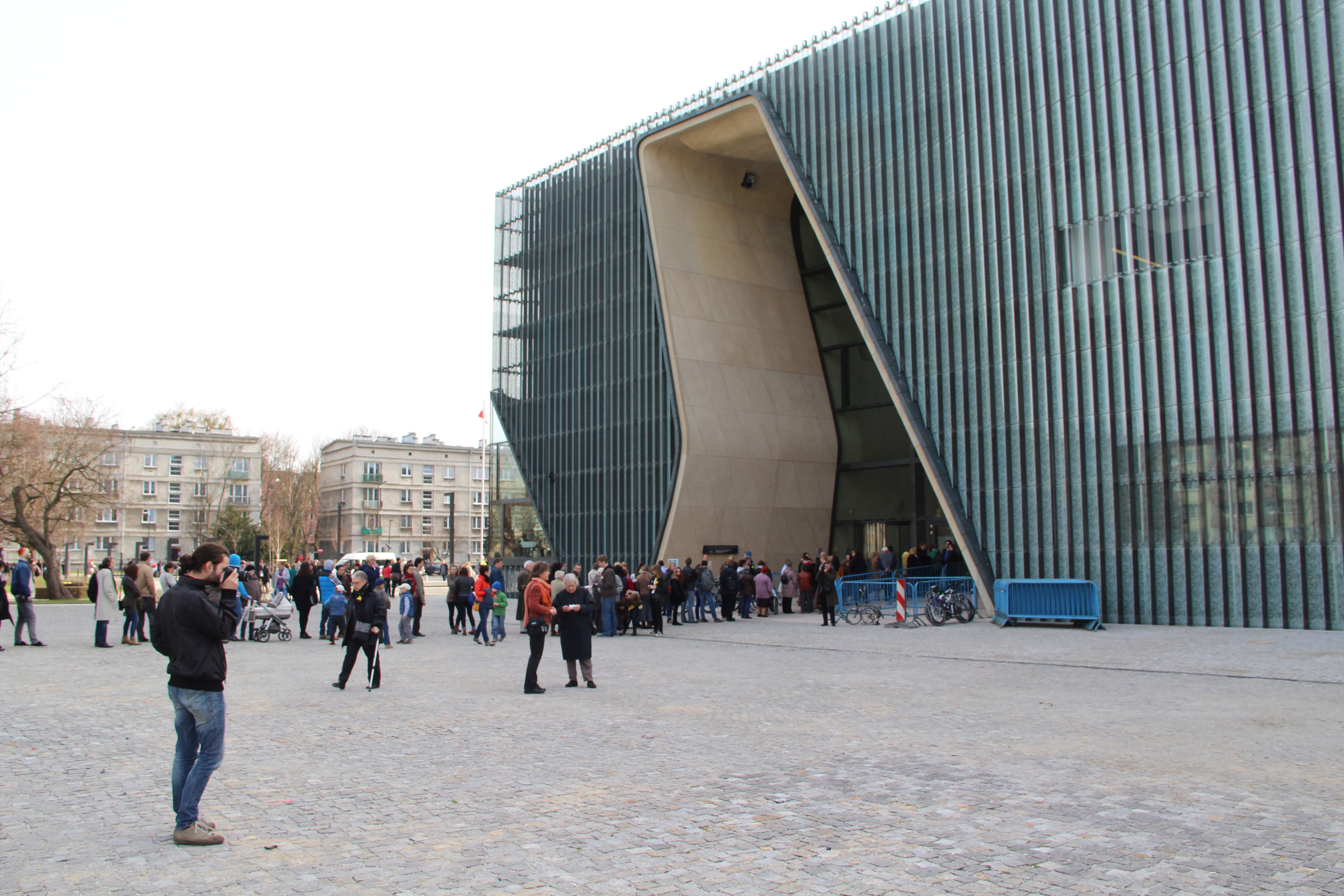 Jüdisches historisches Museum Warschau, Frühling 2013